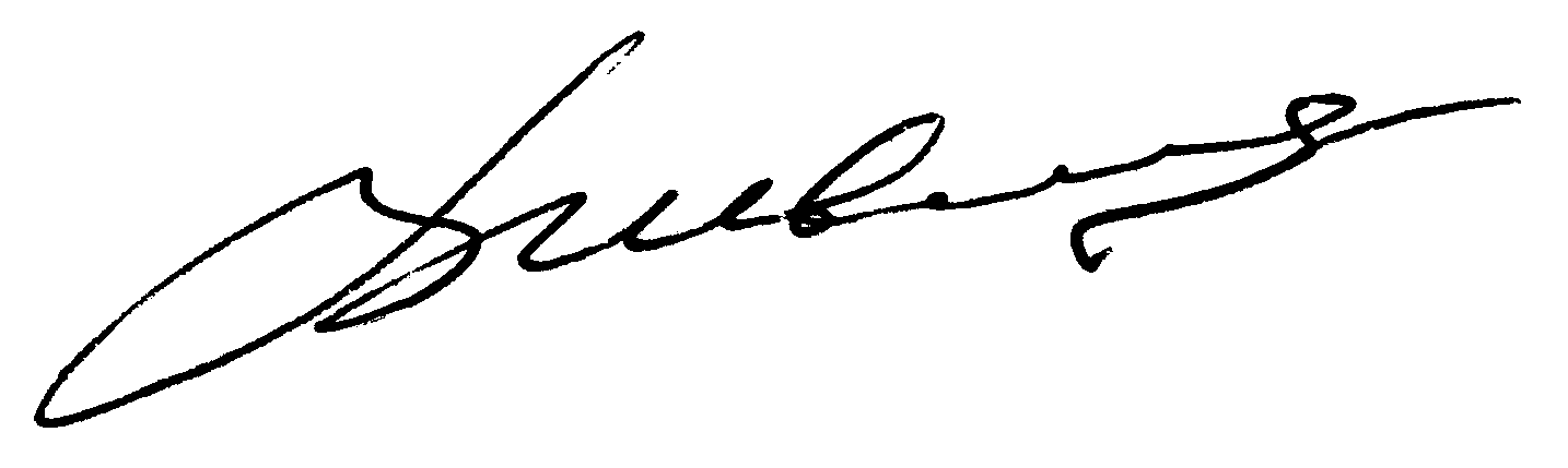 Podpis Wiaczaslawa Szwieda